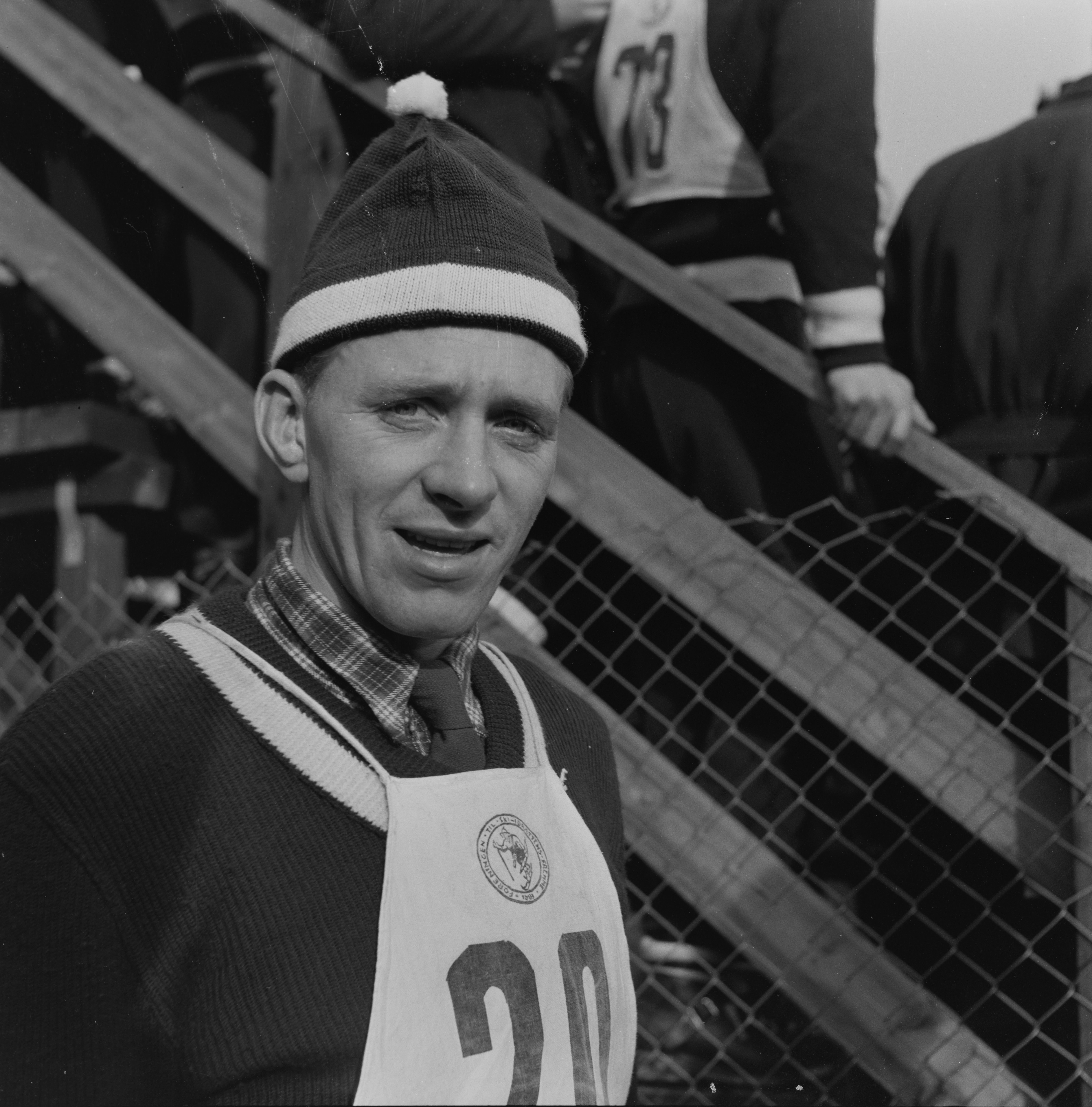 Bildet er hentet fra Arkivverket. Holmenkollen 1953. NÅ nr. 5, 1953 Arkivinstitusjon : Riksarkivet Arkivnavn : Billedbladet NÅ Sted : Norge, Oslo, Oslo, Holmenkollen Emneord: Holmenkollen, Ski, Vintersport Avbildet: Stenersen, Sverre; Kirjonen, Eino; Austad, Otto; Bergmann, Arfinn; Hasu, Heikki